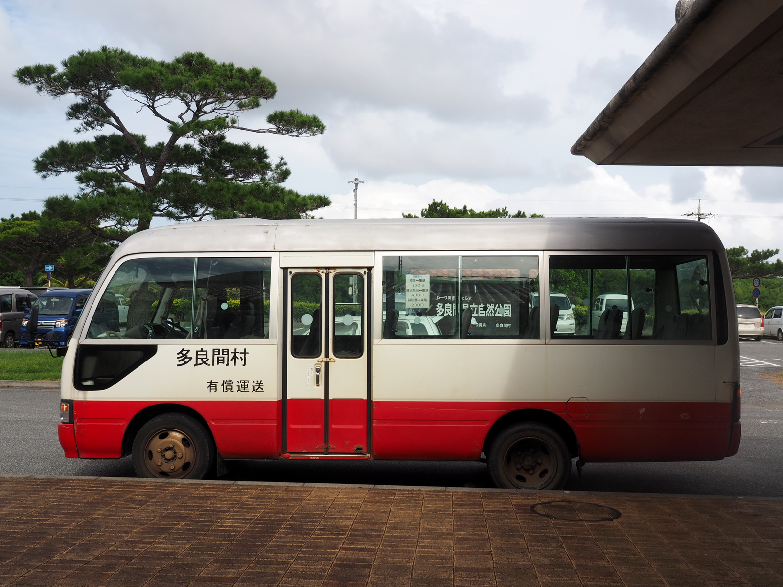 多良間村村営バス（有償運送）（沖縄県宮古郡多良間村多良間島）